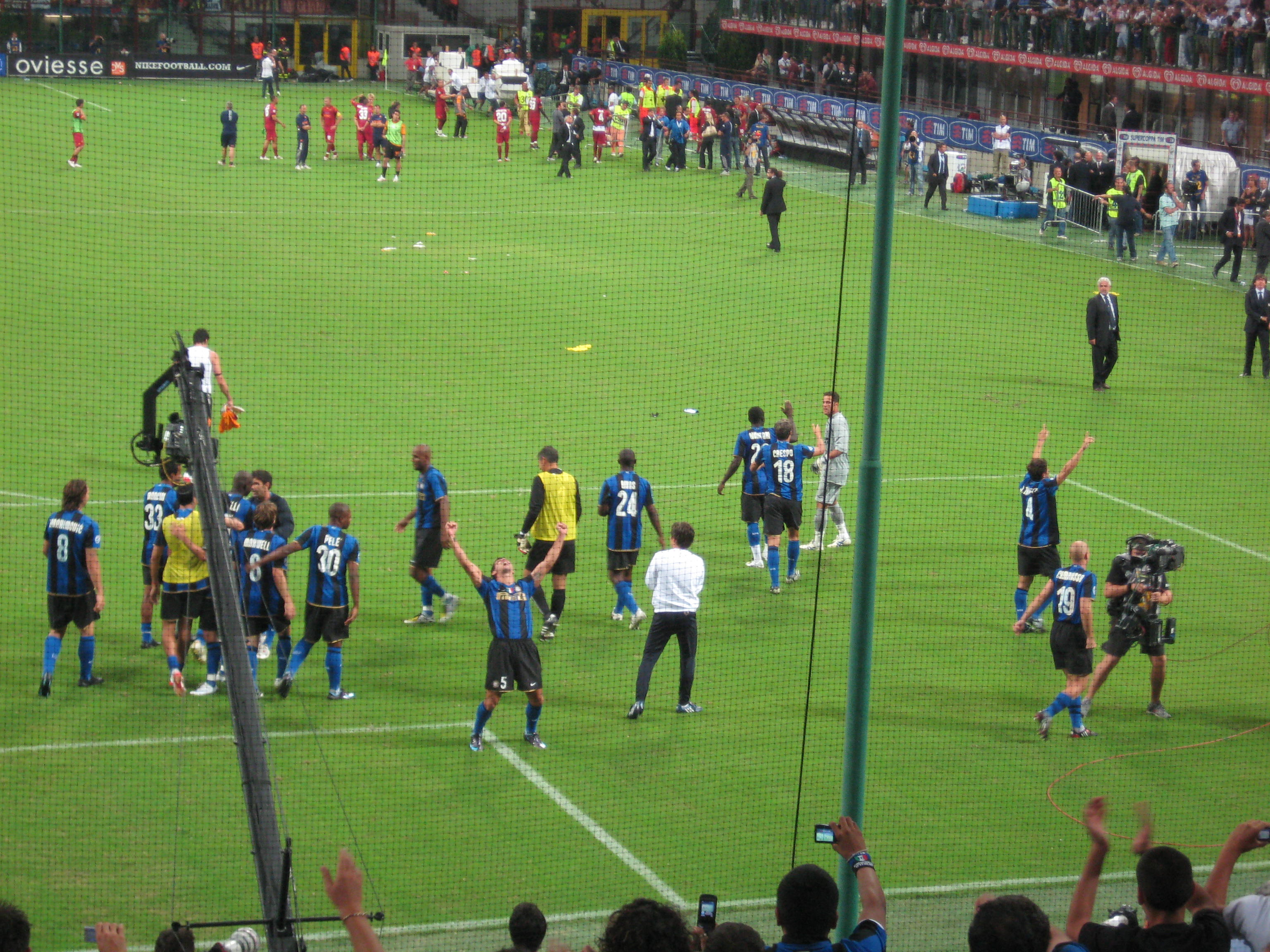 I giocatori dell'Inter festeggiano dopo aver vinto la Supercoppa contro la Roma (2008).